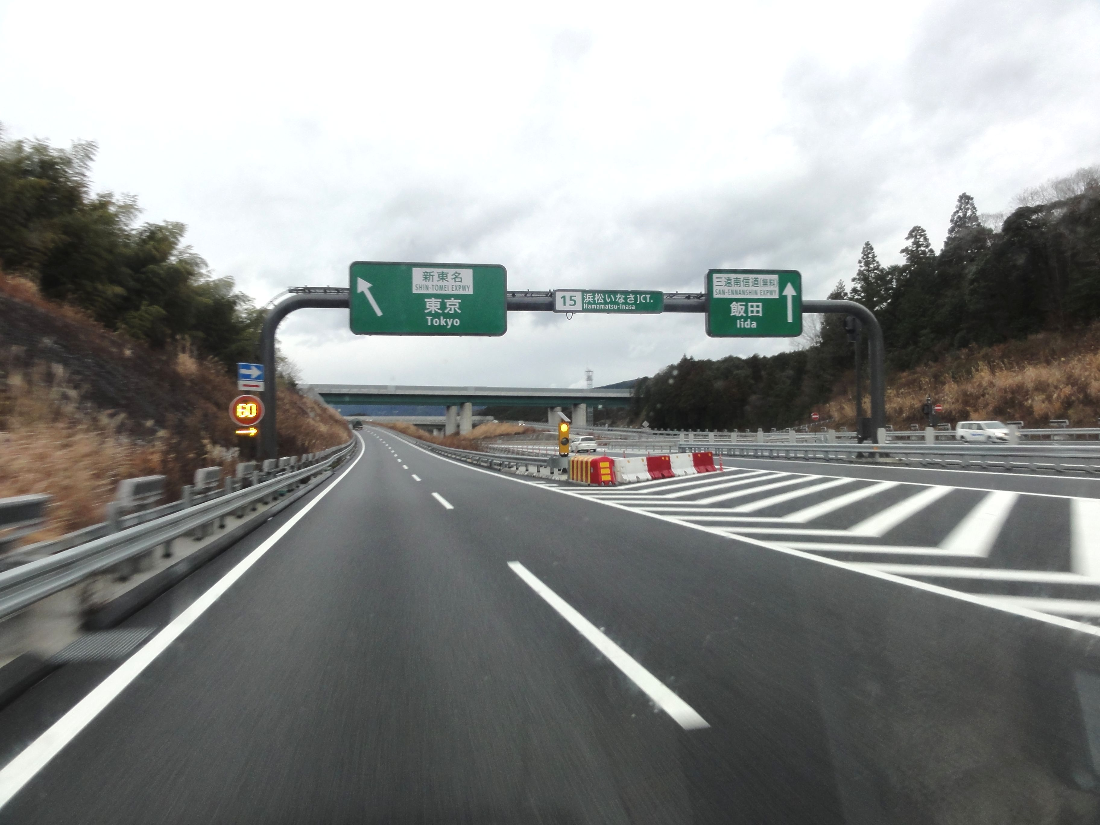 新東名高速道路 浜松いなさジャンクション